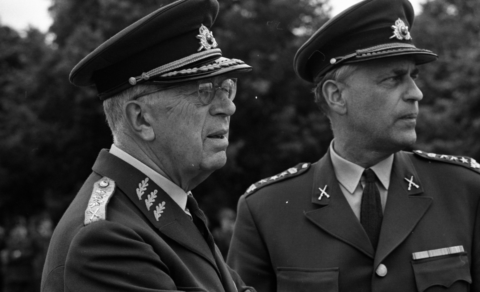 Närbild på kung Gustav VI Adolf som besöker Örebro Livregementes Grenadjärer i Grenadjärstaden. Kungen samtalar med en general.